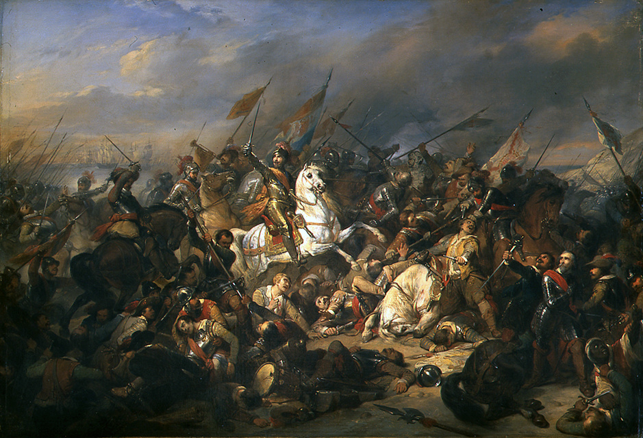 Slag bij Nieuwpoort. De kunstverzameling van de Koning was zowel omvangrijk als divers en omvatte onder meer schilderijen van oude en eigentijdse meesters. Dit schilderij van Nicaise de Keyser (1813-1887) uit 1843 toont een zegevierende Prins Maurits in de Slag bij Nieuwpoort (1600) met rechts op de voorgrond de verslagen Spaanse legeraanvoerder Francisco de Mendoza.